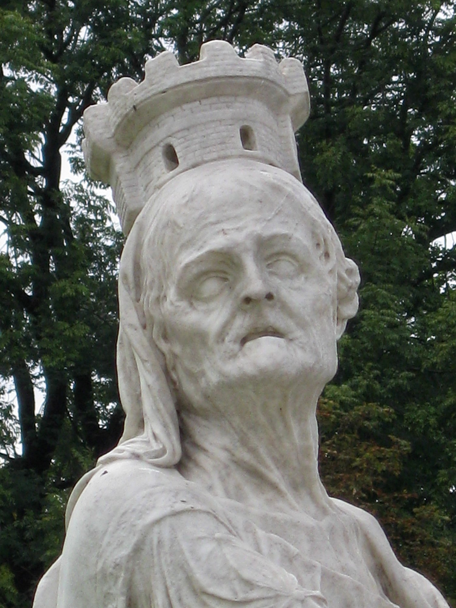 Schlosspark Nymphenburg, Statue im Gartenparterre, Kybele von Giovanni Marchiori, 1765